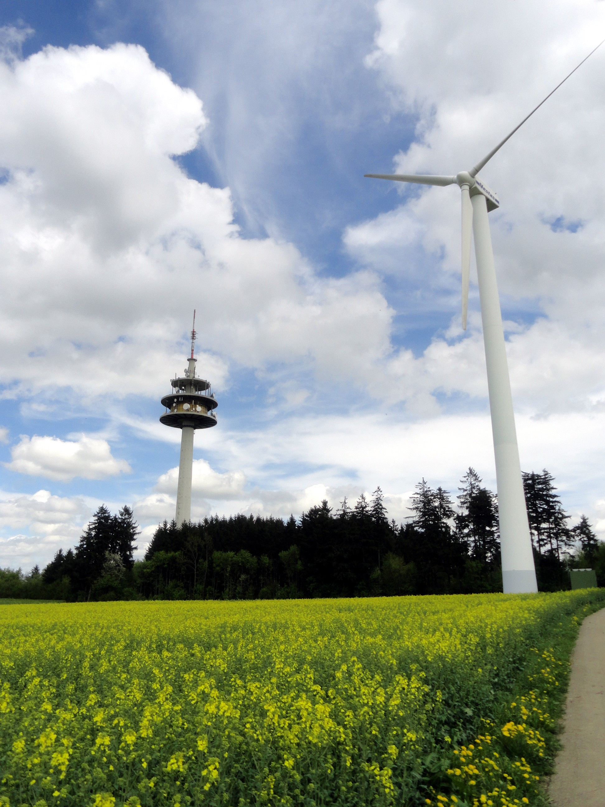 Sender Schnittlingen mit Vestas Windkraftanlage